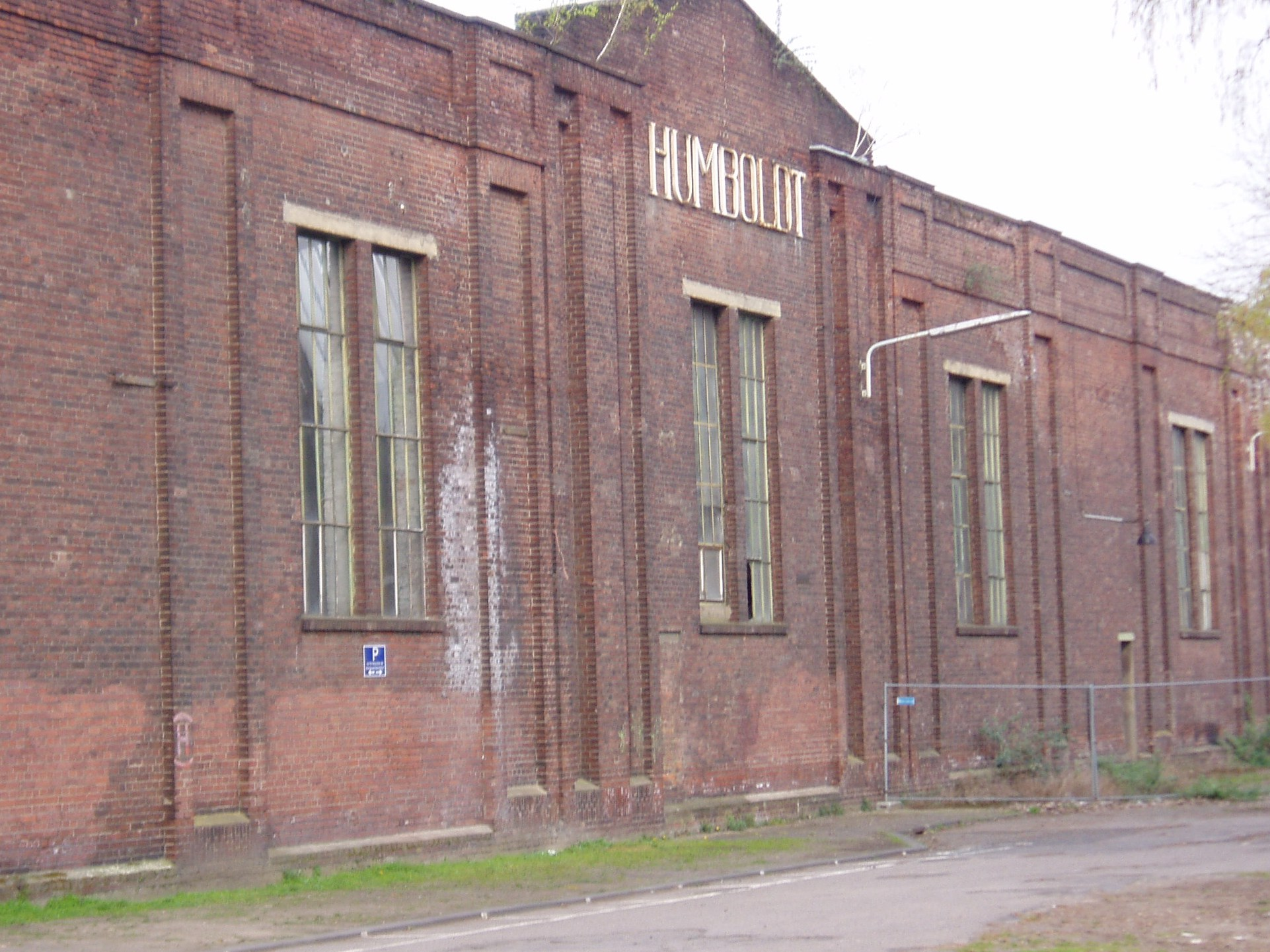 Köln-Kalk – ehemalige Fabrikationshalle von Klöckner-Humboldt-Deutz (KHD)